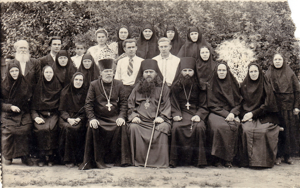 Насельницы Тихвинского Богородицкого монастыря с епископом Борисом (Виком) (?)